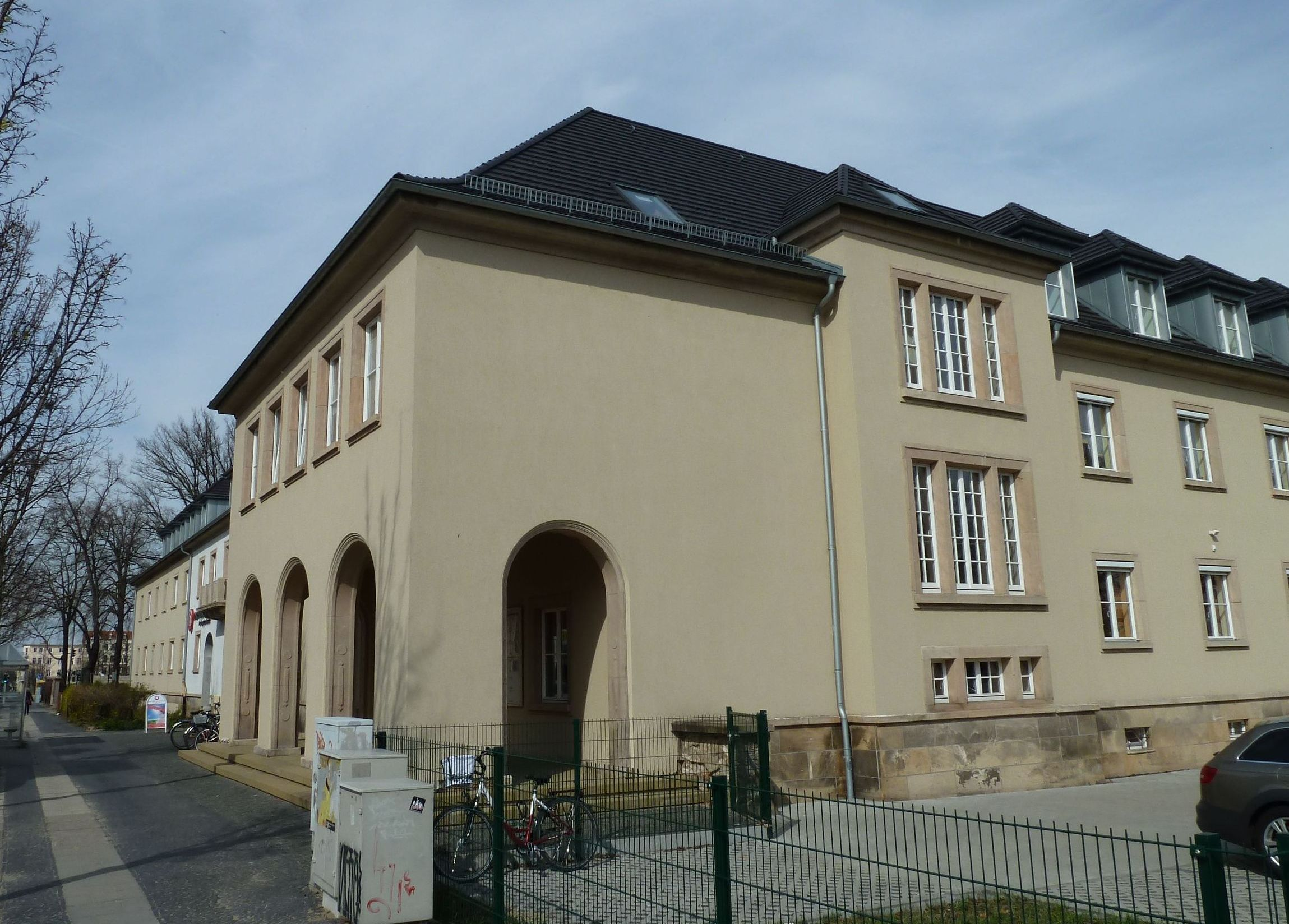 Cottbus, Schillerstraße 21/22. Ehemalige Heeresverwaltung, später Sitz der Reichsbahndirektion, heute Ärztehaus. Das Gebäude vom Ende der 1930er Jahre ist denkmalgeschützt.